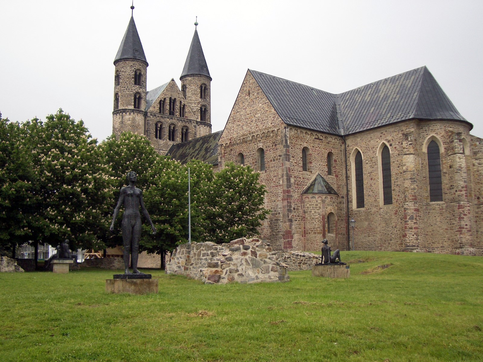 Klosteranlage Kloster Unser Lieben Frauen in Magdeburg. Blick auf die Großplastiksammlung neben der Klosterkirche.